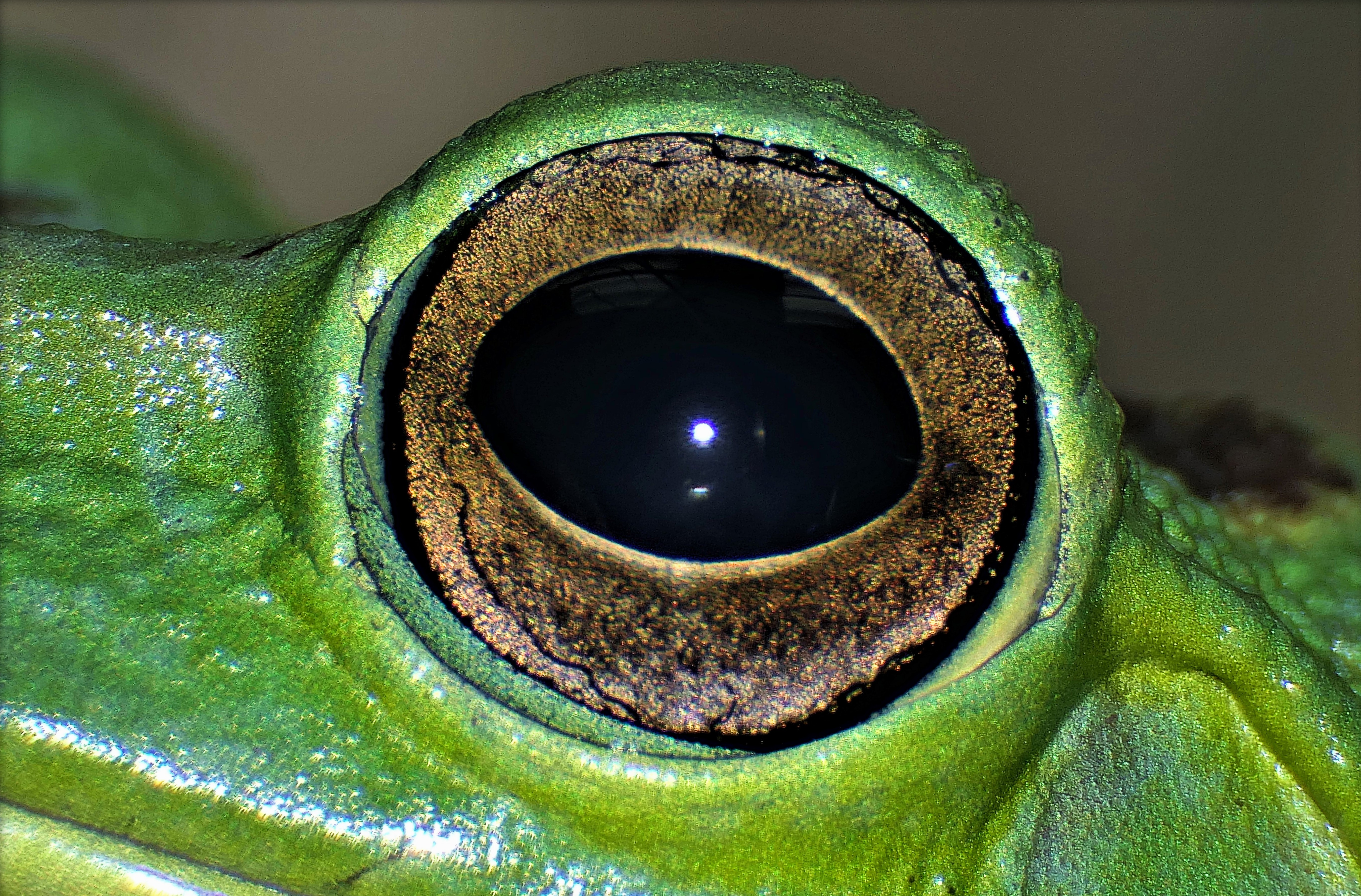 Auge eines chinesischen Flugfroschs - mit der Lumix FZ2000 und einer Pentax Achromat Vorsatzlinse. Mit Digitalzoom.